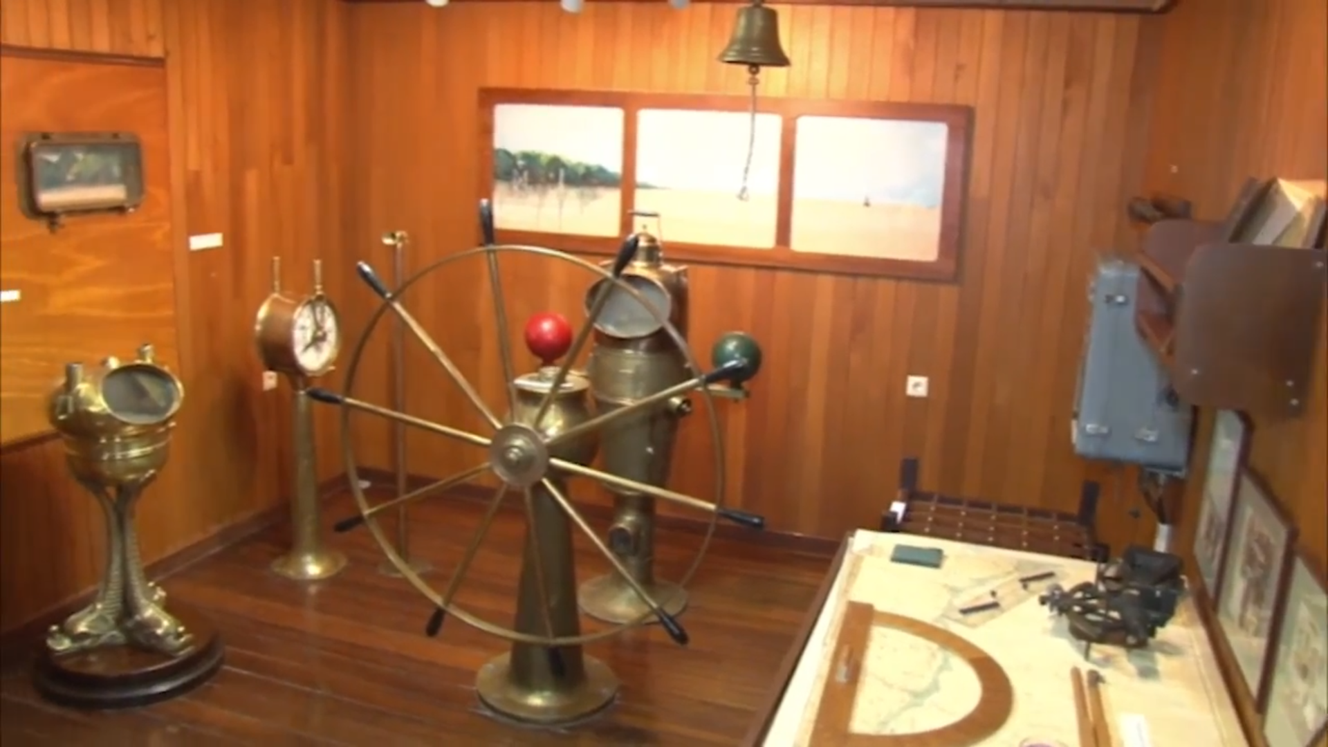 Maritiem Museum, Maritieme Autoriteit Suriname, Paramaribo, Suriname